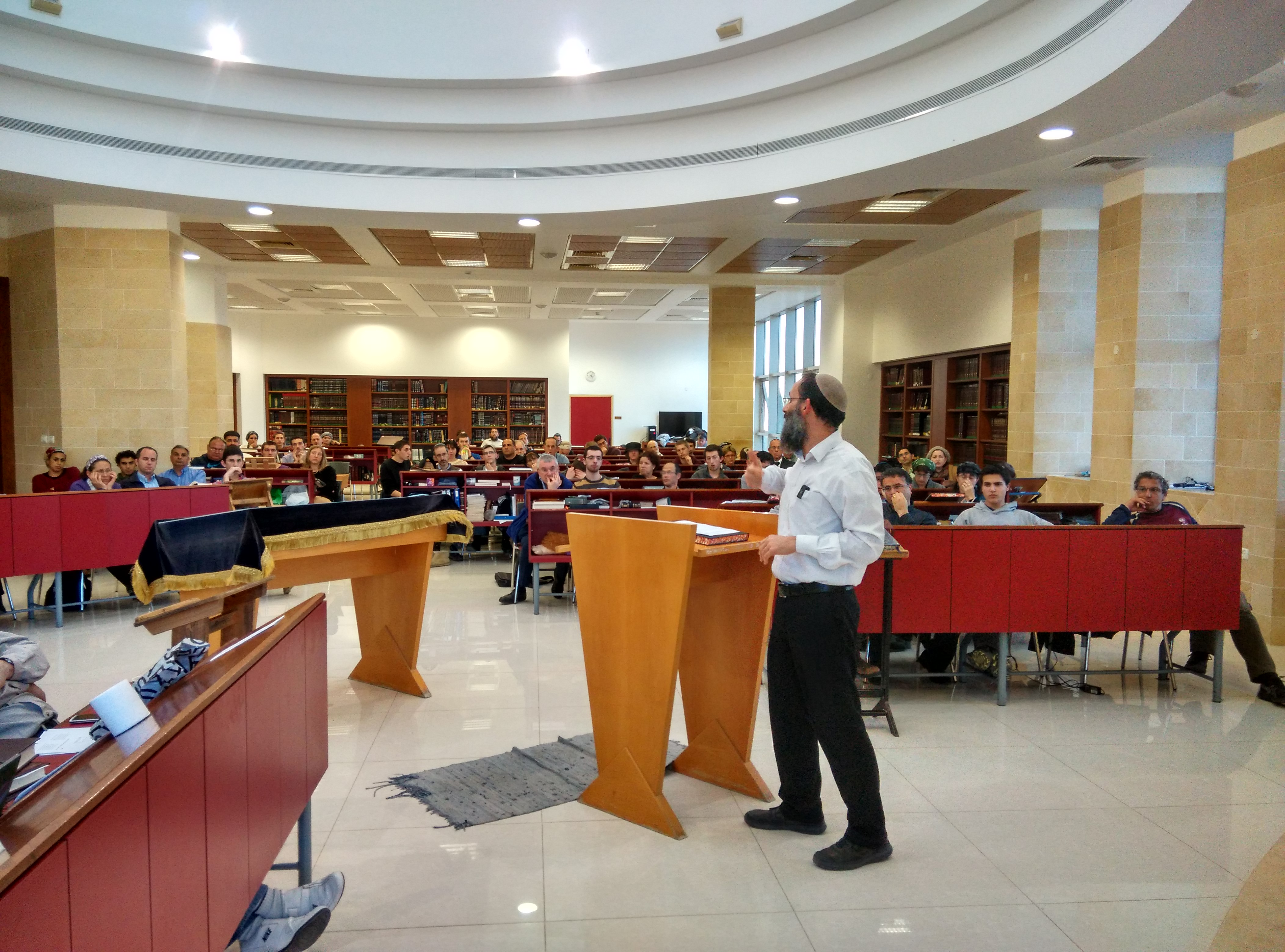 שיעור כללי של ראש הישיבה, הרב שלמה וילק, בערב הורים תשע"ו